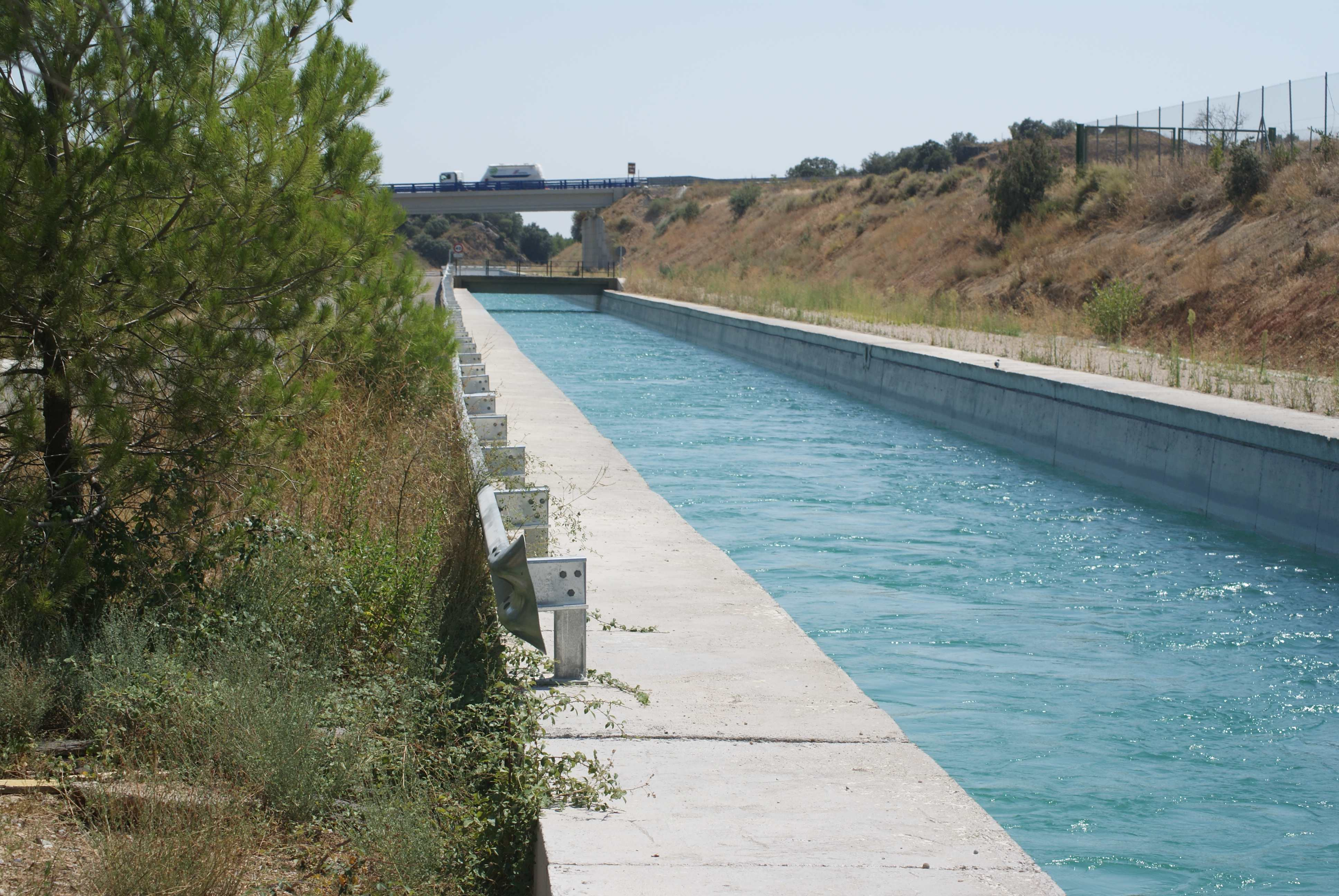 Canal del río cinca a su paso por el pueblo de Peraltilla. Este canal lleva el regadío a la zona sur de la provincia de Huesca.